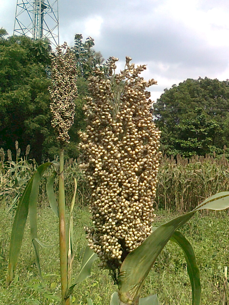 Sorghum farm in Raver tahsil, Maharashtra, India